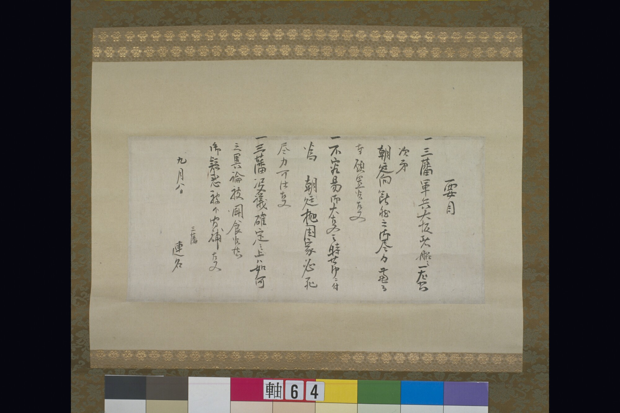 吉田松陰とその同志展 維新DBリスト:展示品45 奥書等:改装前の外題に「慶応三丁卯九月京都上京平孫別荘(薩藩岩下佐次右衛門旅宿)ニ於テ」の識語あり 大久保利通 天保1年(1830)～明治11年(1878) 鹿児島藩士。西郷隆盛、木戸孝允とともに維新の三傑といわれる。初代の内務卿となり実質的に日本の最初の首相であった。これは薩(鹿児島)、長(山口)、藝(廣島) 三藩が武力倒幕に向けて盟約を結んだ際の、大久保利通自筆の盟約草稿である。慶応3年(1867) 9月8日、京都で大久保利通、西郷隆盛、品川彌二郎、廣沢真臣(長) と辻将曹(藝) が会して決盟された。「一、三藩軍兵大坂着船之一左右次第、朝廷向斷然之御尽力、兼而奉願置候事。 / 一、不容易御大事之時節ニ付爲、朝廷拠國家必死尽力 / 可仕事。 / 一、三藩決議確定之上ハ如何之異論被聞食候共、御疑或被下間鋪事 / 九月八日 三藩連名」 A It is a rough draft on the Restraction of Imperial Rule, written by OKUBO TOSHIMICHI(1830-1878). He wrote it when delegates from Satsuma, Choshu and Aki domains got together in Kyoto. Some after this meeting, this coup d'etat become true.